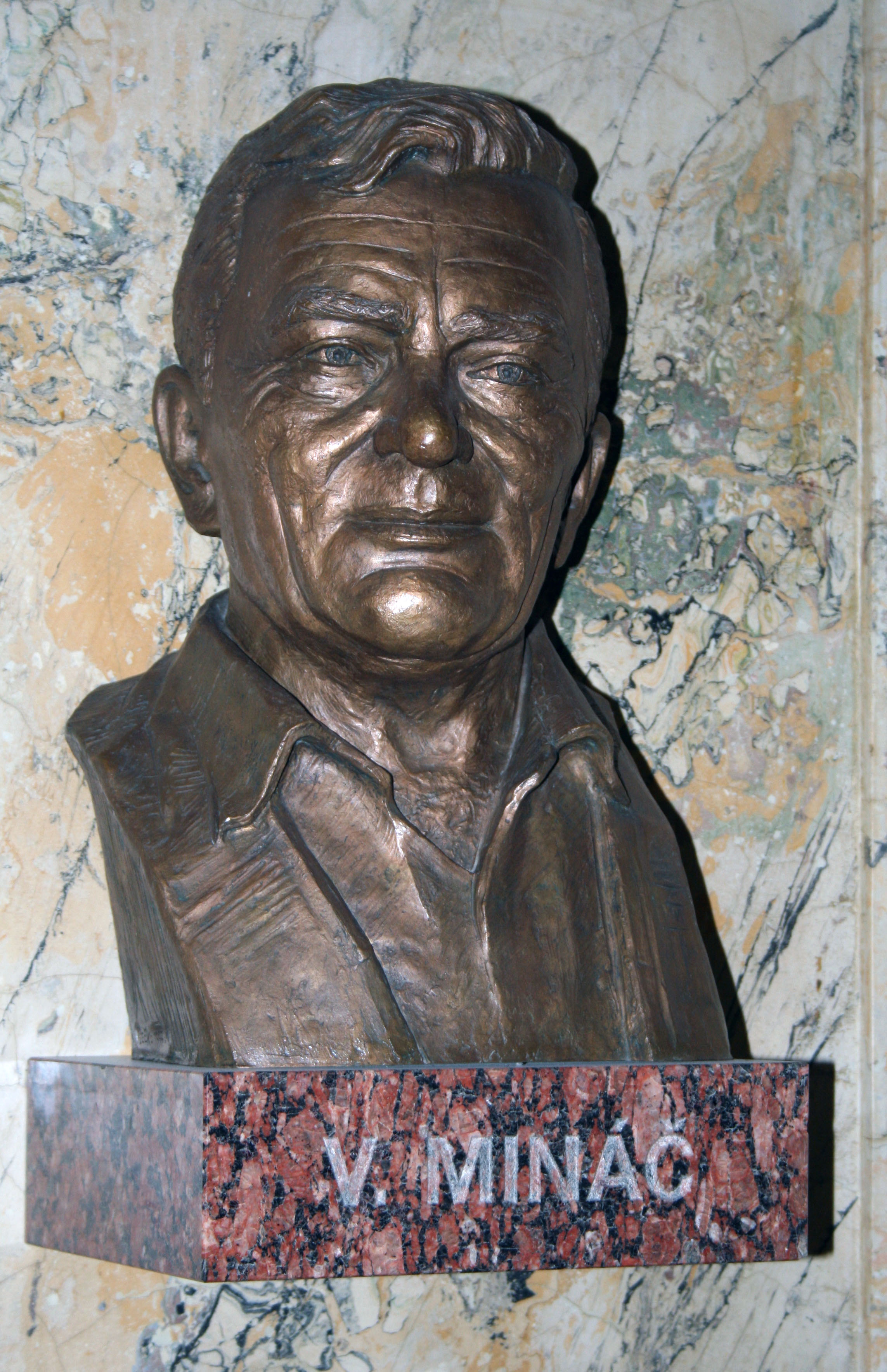 Busta spisovateľa Vladimíra Mináča 1922 - 1996